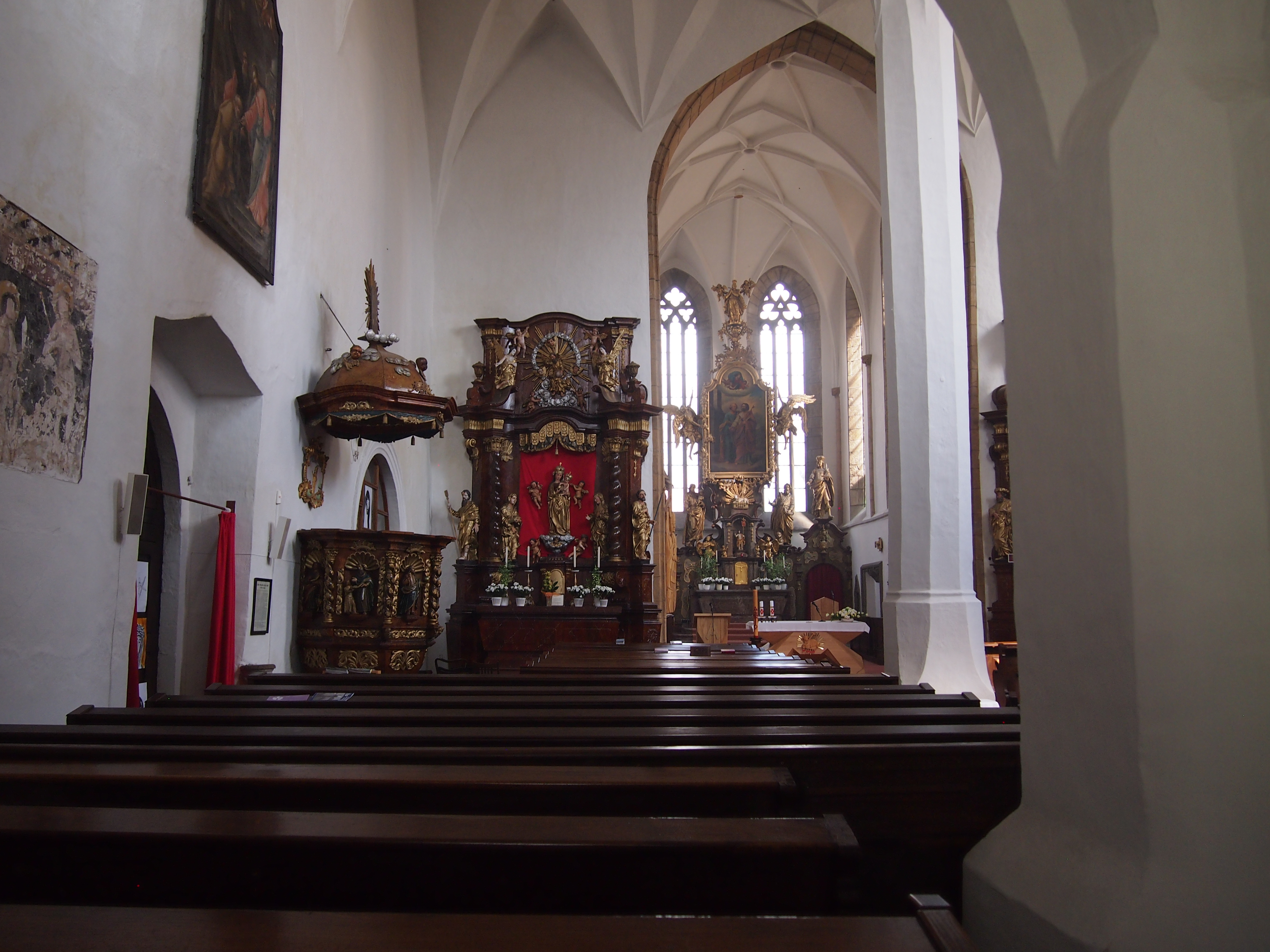 Kostel_svateho_Petra-a-Pavla_9